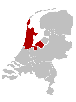 Locatie Bisdom Haarlem-Amsterdam, eigen werk